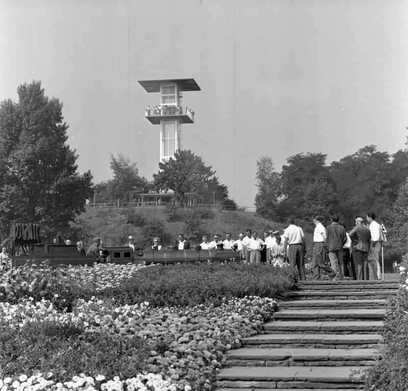 Bundesgartenschau 1961 in Stuttgart